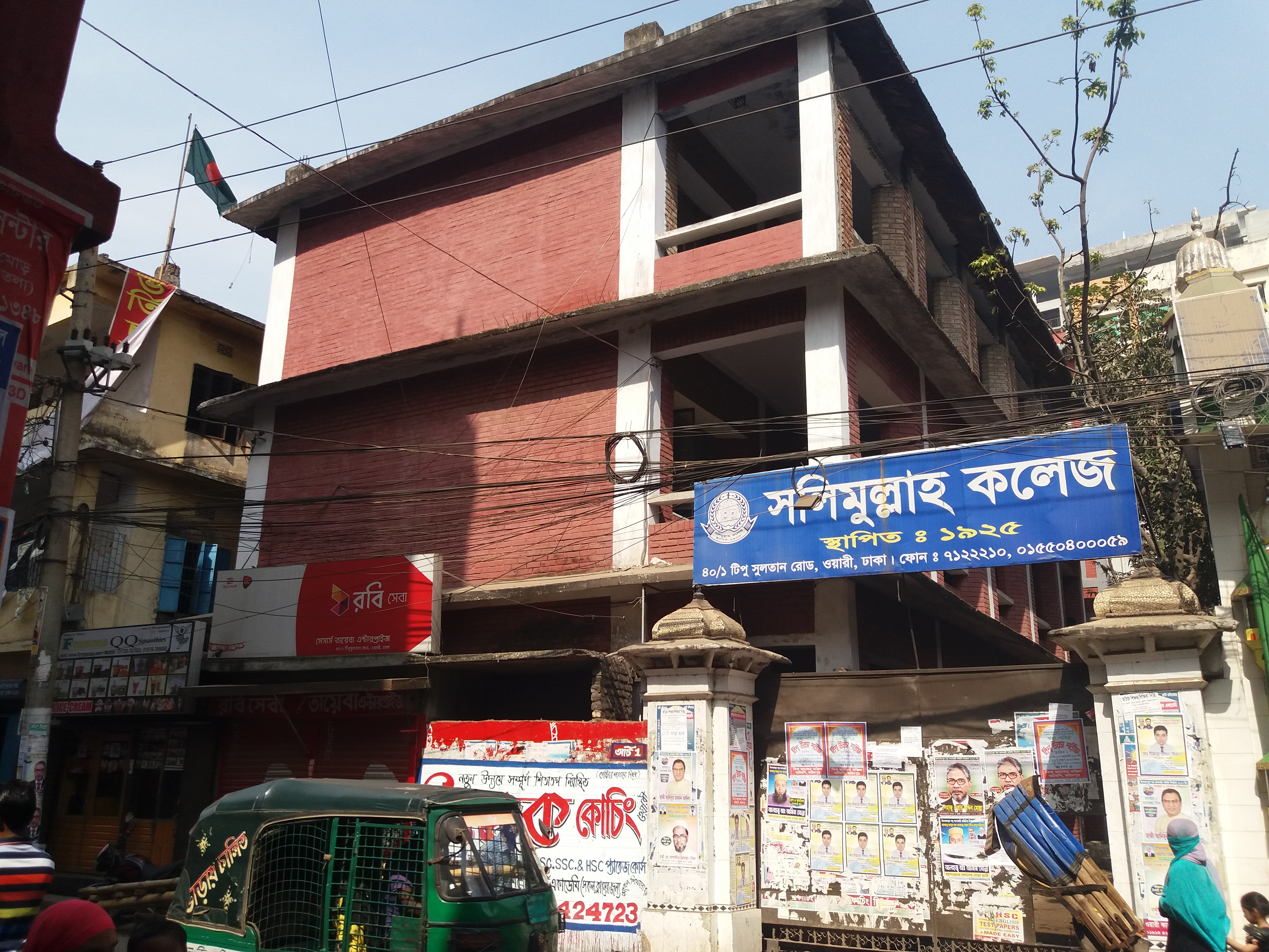 এই কলেজটি ঢাকার টিপু সুলতান রোডে অবস্থিত, এই স্থানে পূর্বে ভজহরি লজ নামের একটি সুদৃশ্য ভবন ছিল